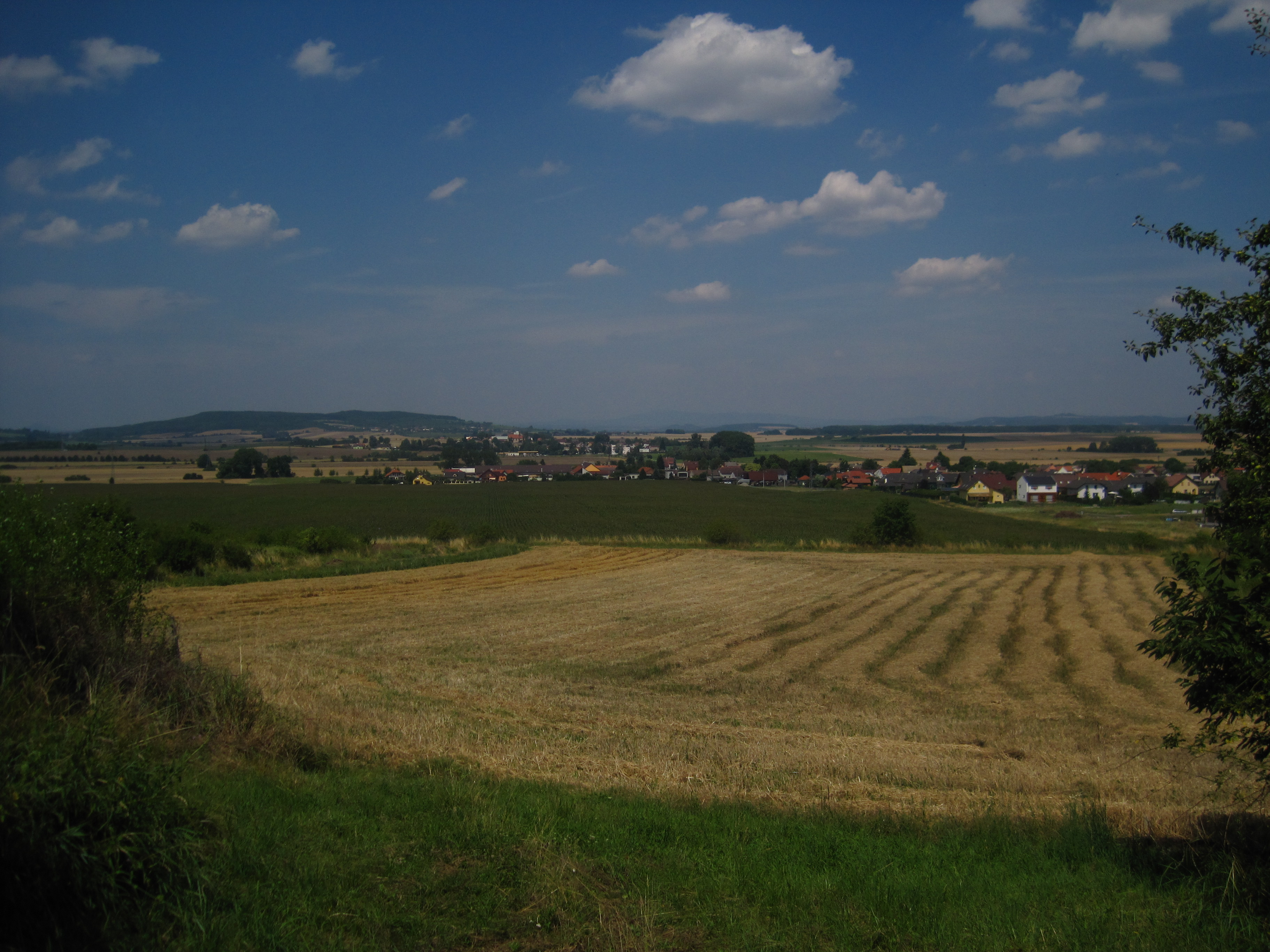 Kolomuty od jihu (od silnice na Holé Vrchy)